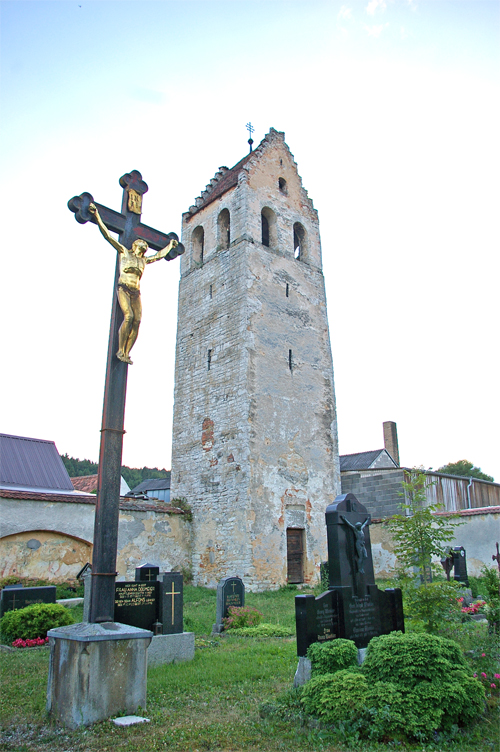 Der Turm der ehemaligen Pfarrkirche in Ensdorf (Lkr. Amberg-Sulzbach, Bayern, Deutschland) aus dem 11. Jahrhundert.